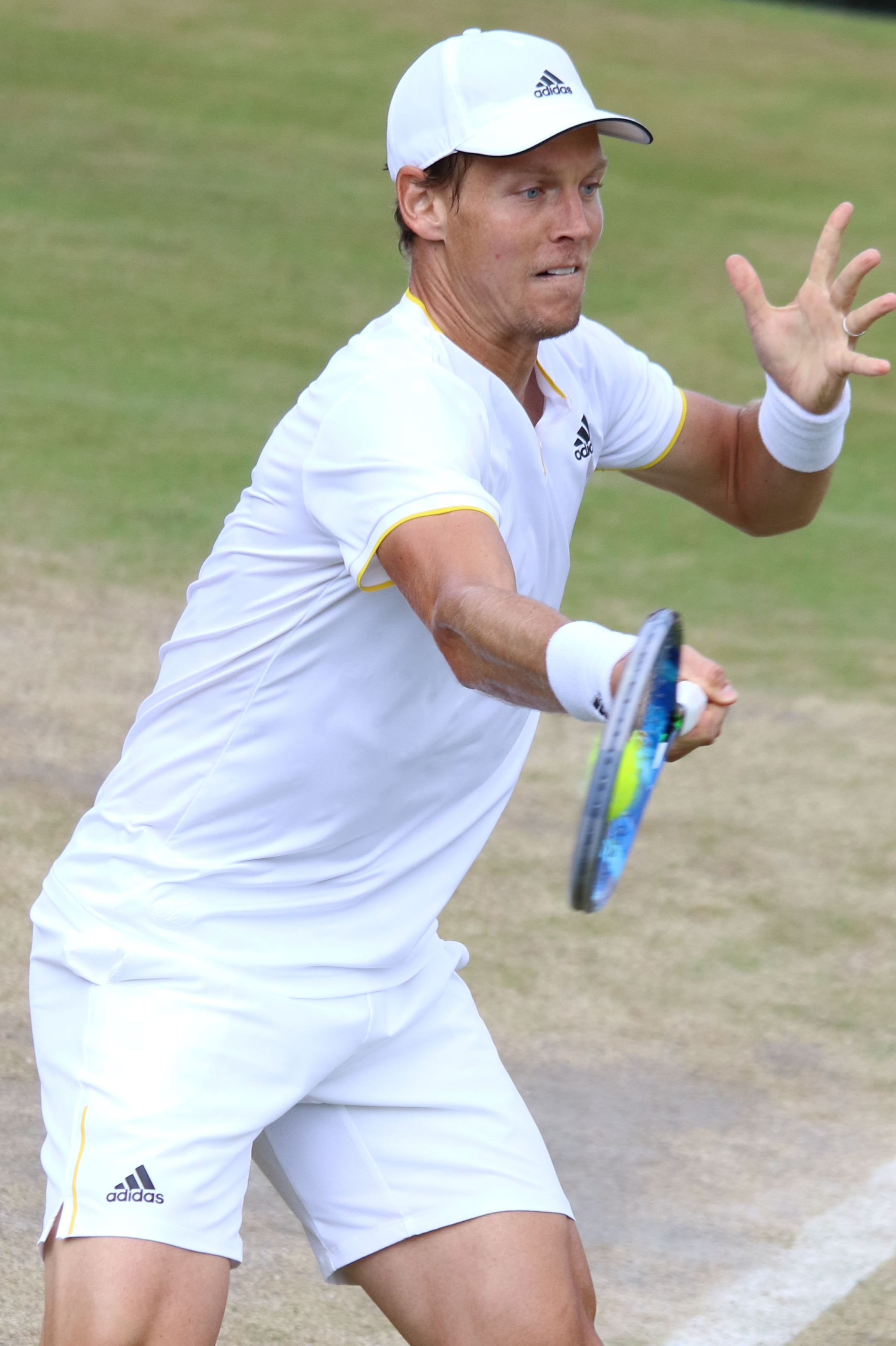 Berdych WM17 (49)